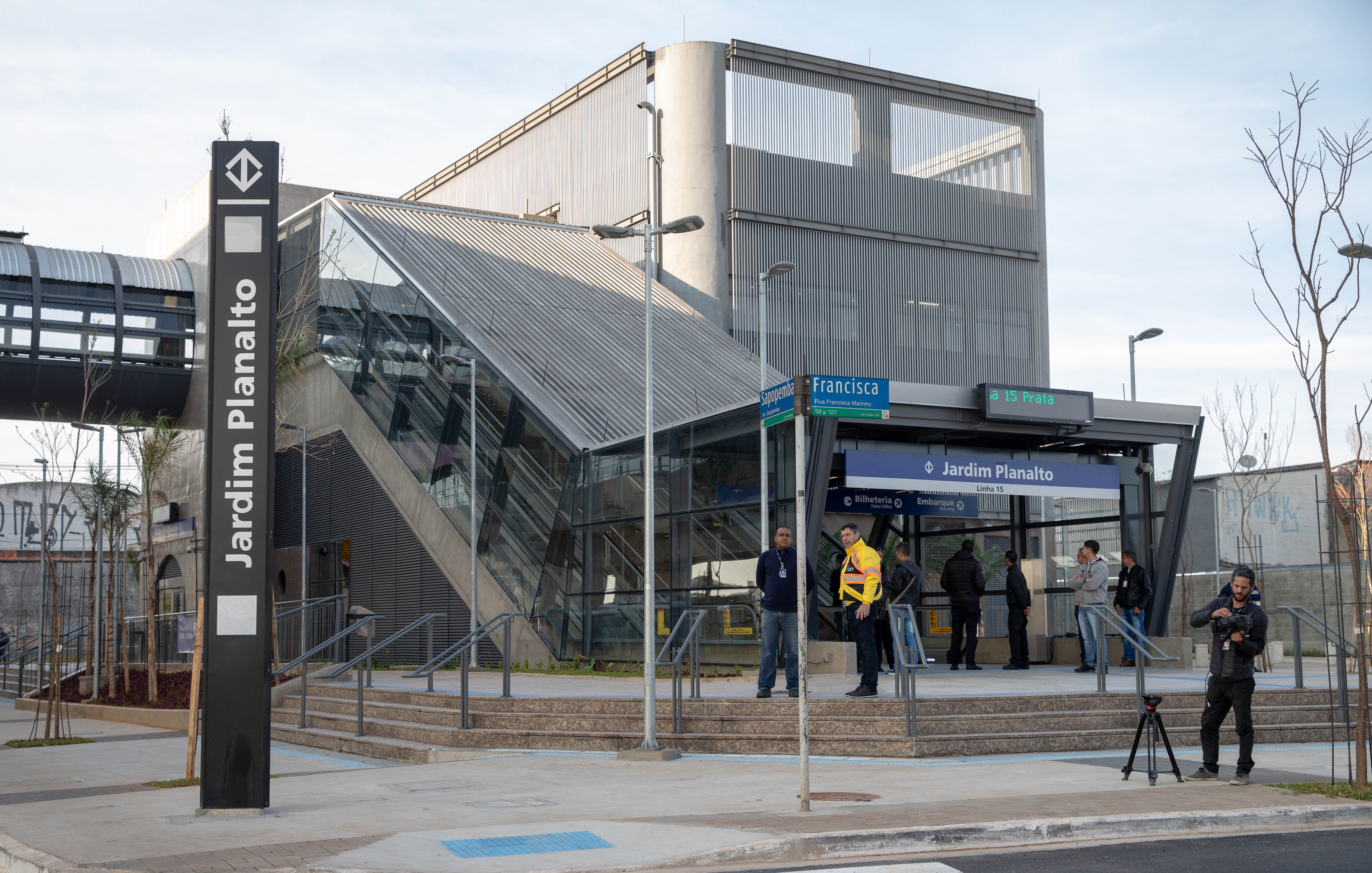 O Governador do Estado de São Paulo, João Doria, participa da inauguração da Estação Jardim Planalto da Linha 15-Prata do Metrô. Local: São Paulo/SP. Data: 26/08/2019. Foto: Governo do Estado de São Paulo.